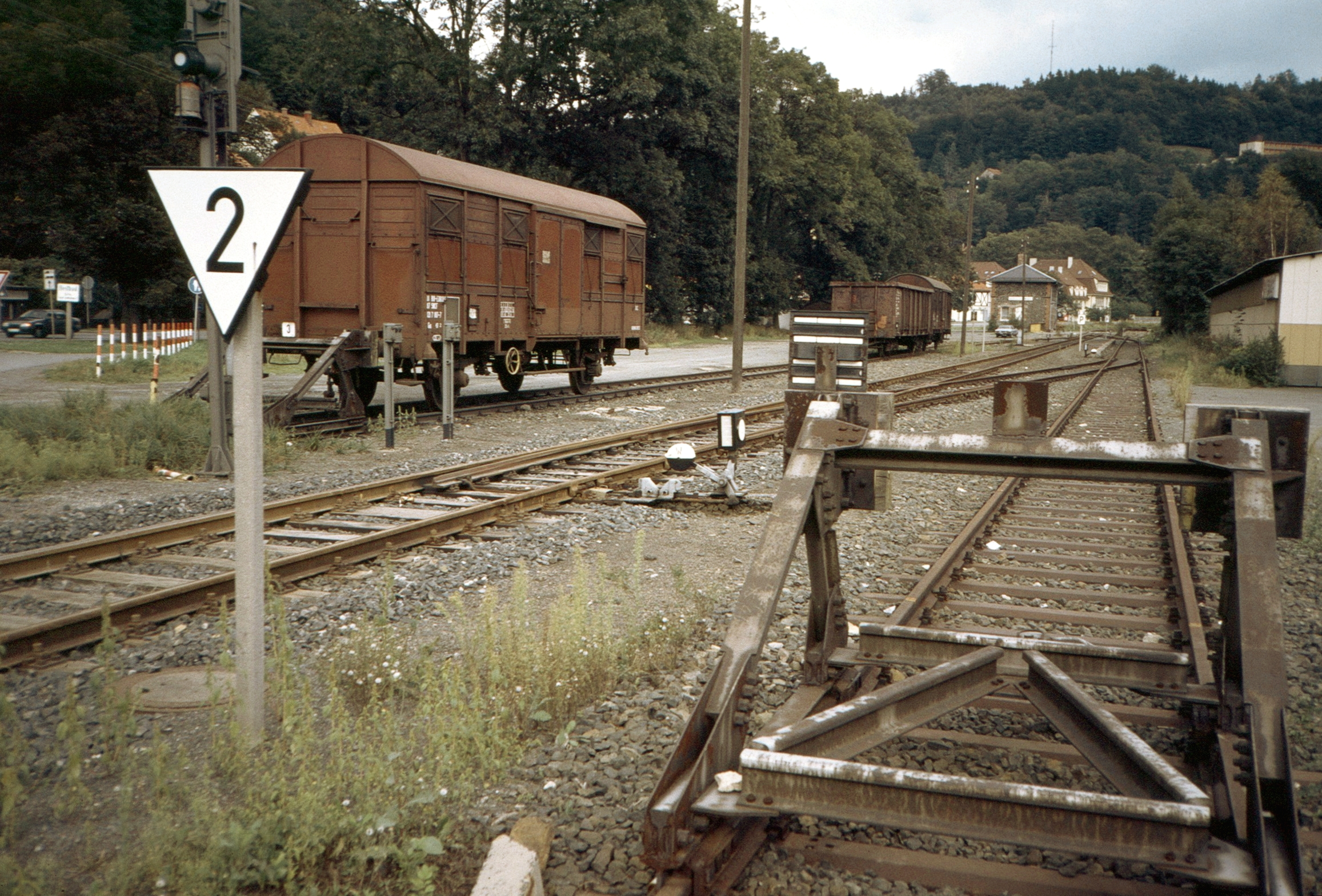 Bahnhof Bad Berneck (Scan von Dia)